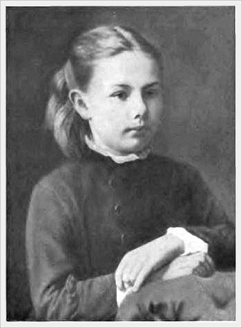 Nadezda Krupskaja (1869-1939) a 10 anni